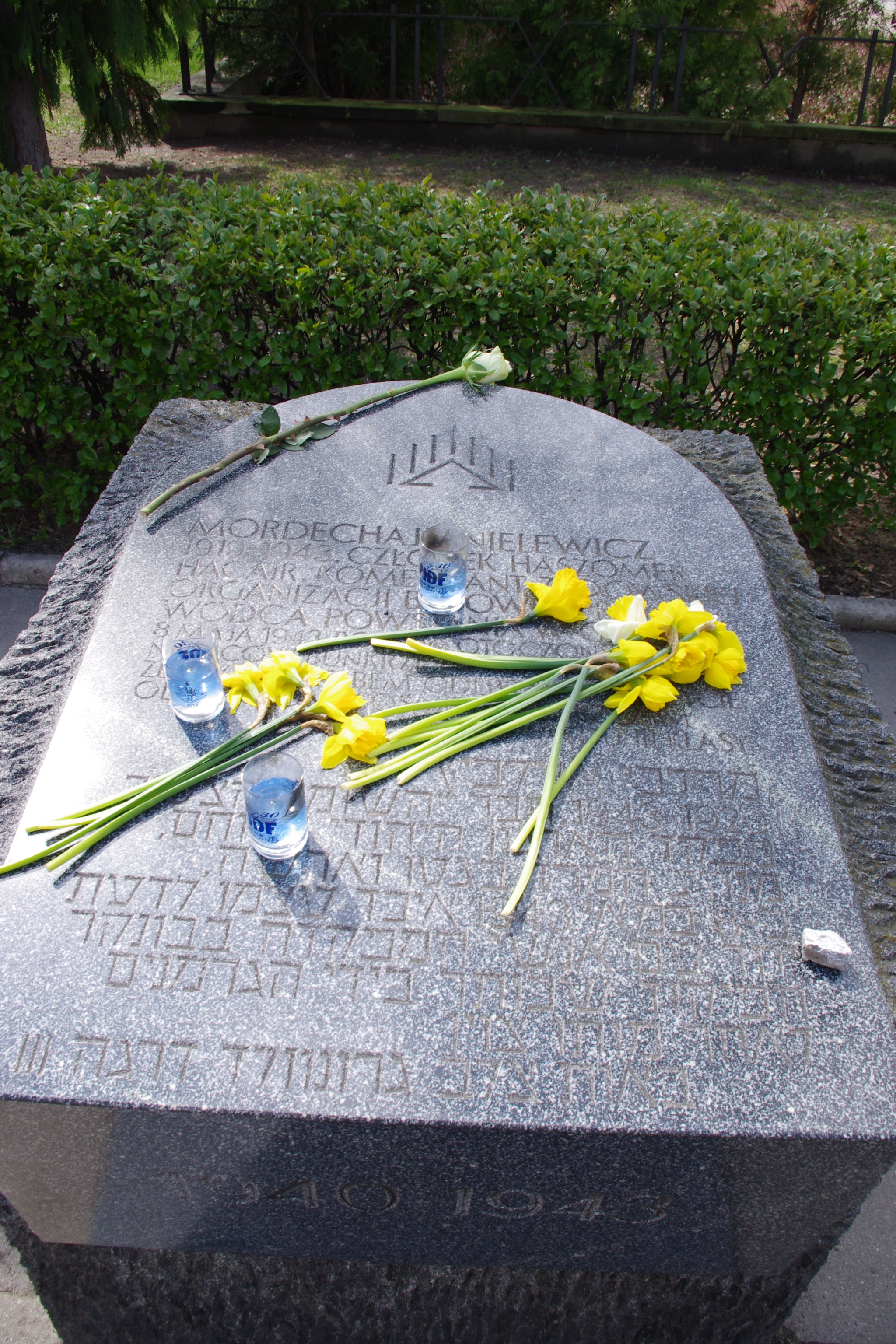 Kamień upamiętniający Mordechaja Anielewicza na ul. Zamenhofa w Warszawie.